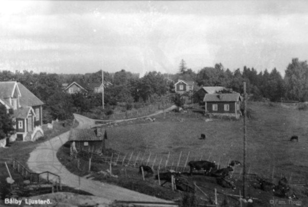 Bolby by på Ljusterö någon gång i början på 1900 talet med Arken, Frälsningsarmens byggnad till vänster i bild.